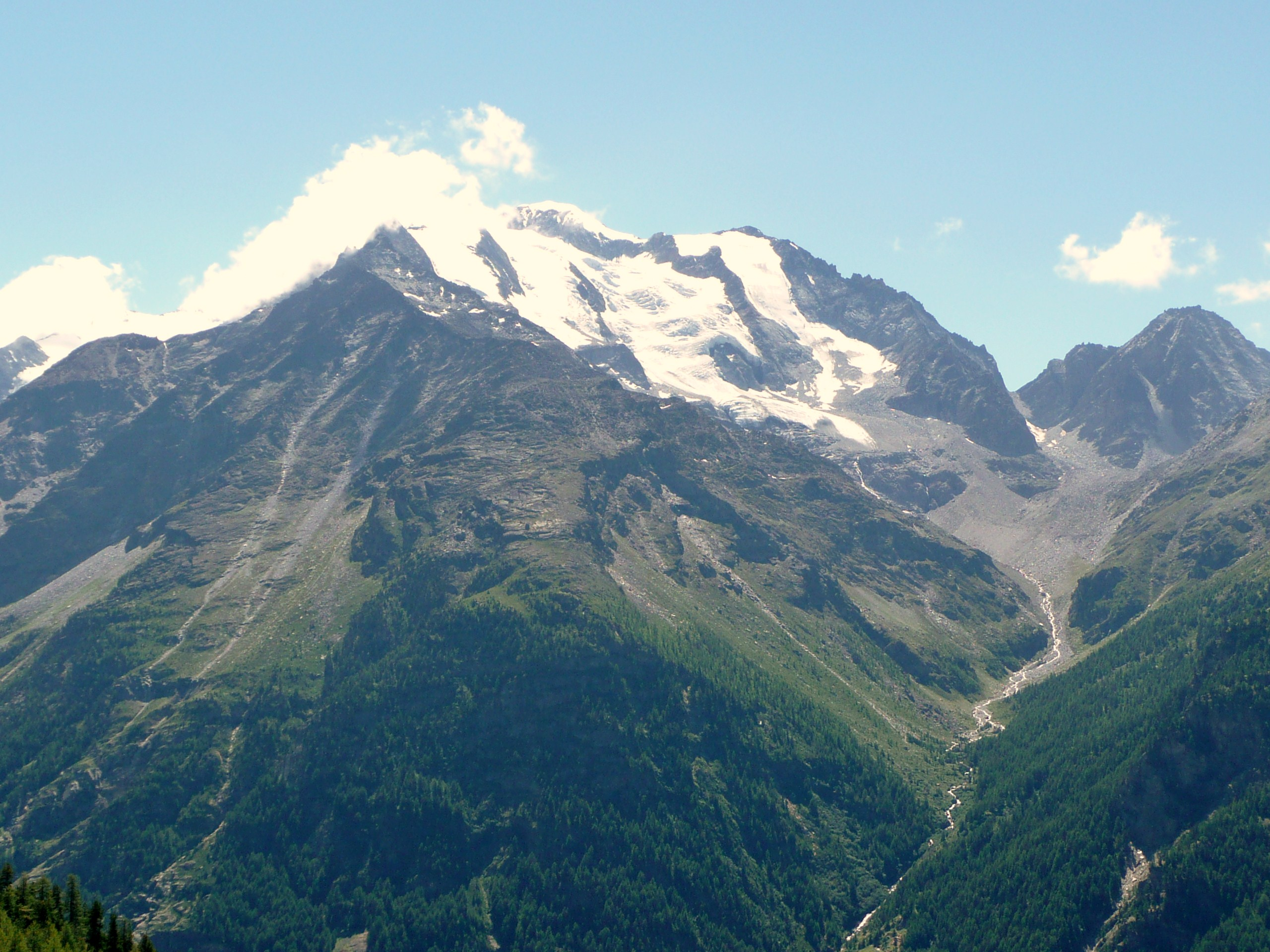 Balfrin, Berg im Kanton Wallis, von Norden mit dem Balfringletscher.